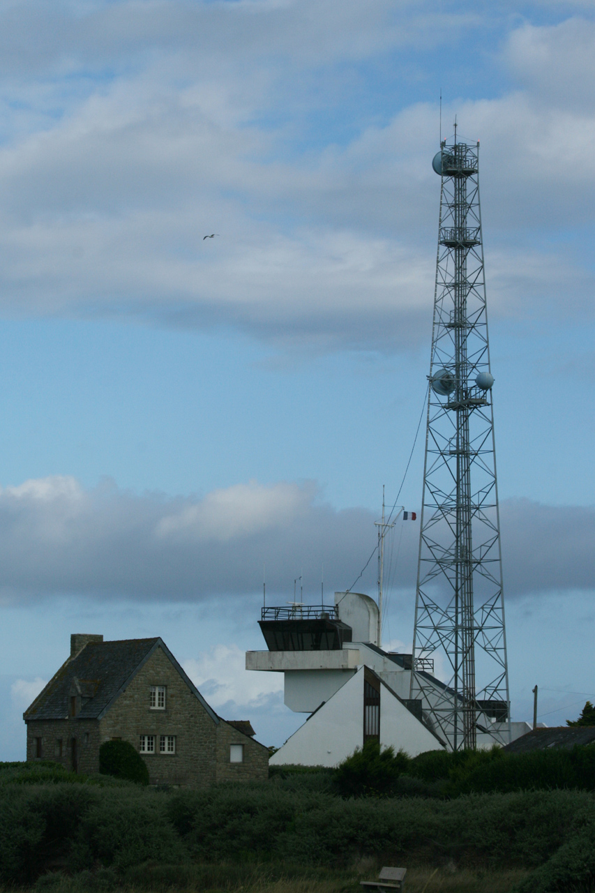 Semaphore de Piriac